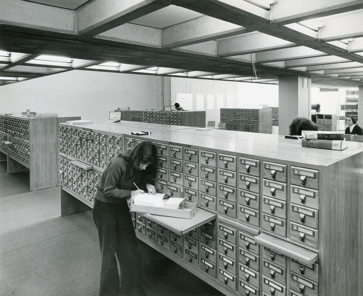 קטלוג הכרטיסיות בספרייה